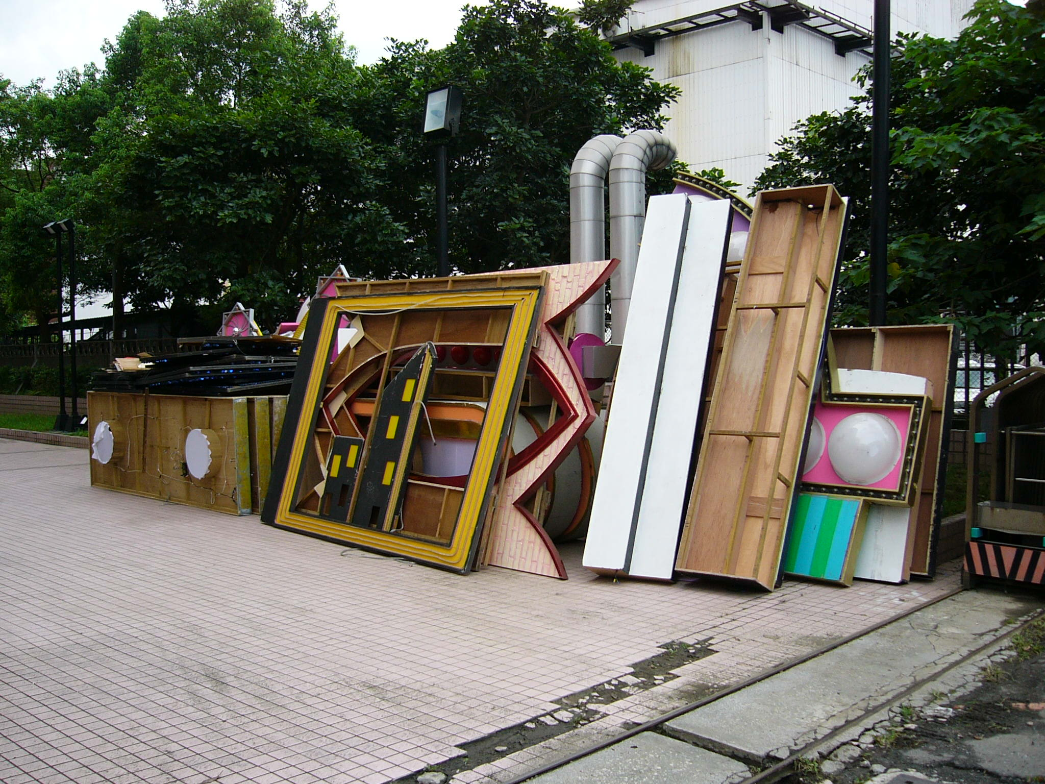 中國電視公司綜藝節目《綜藝大哥大》2000年代末代佈景之景片，放置於中國電視公司第二大樓後方。